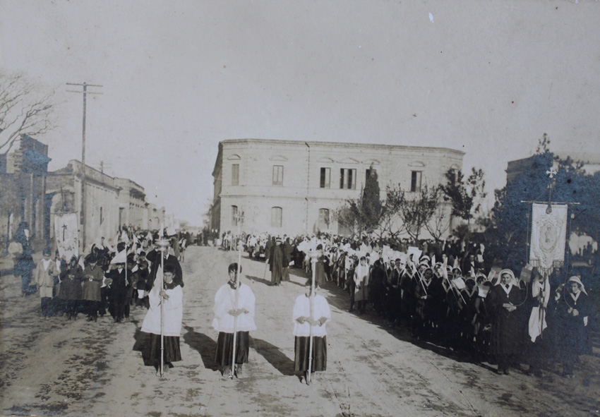 Procesiòn de inicios del siglo XX en Villa del Rosario, Cordoba, Argentina